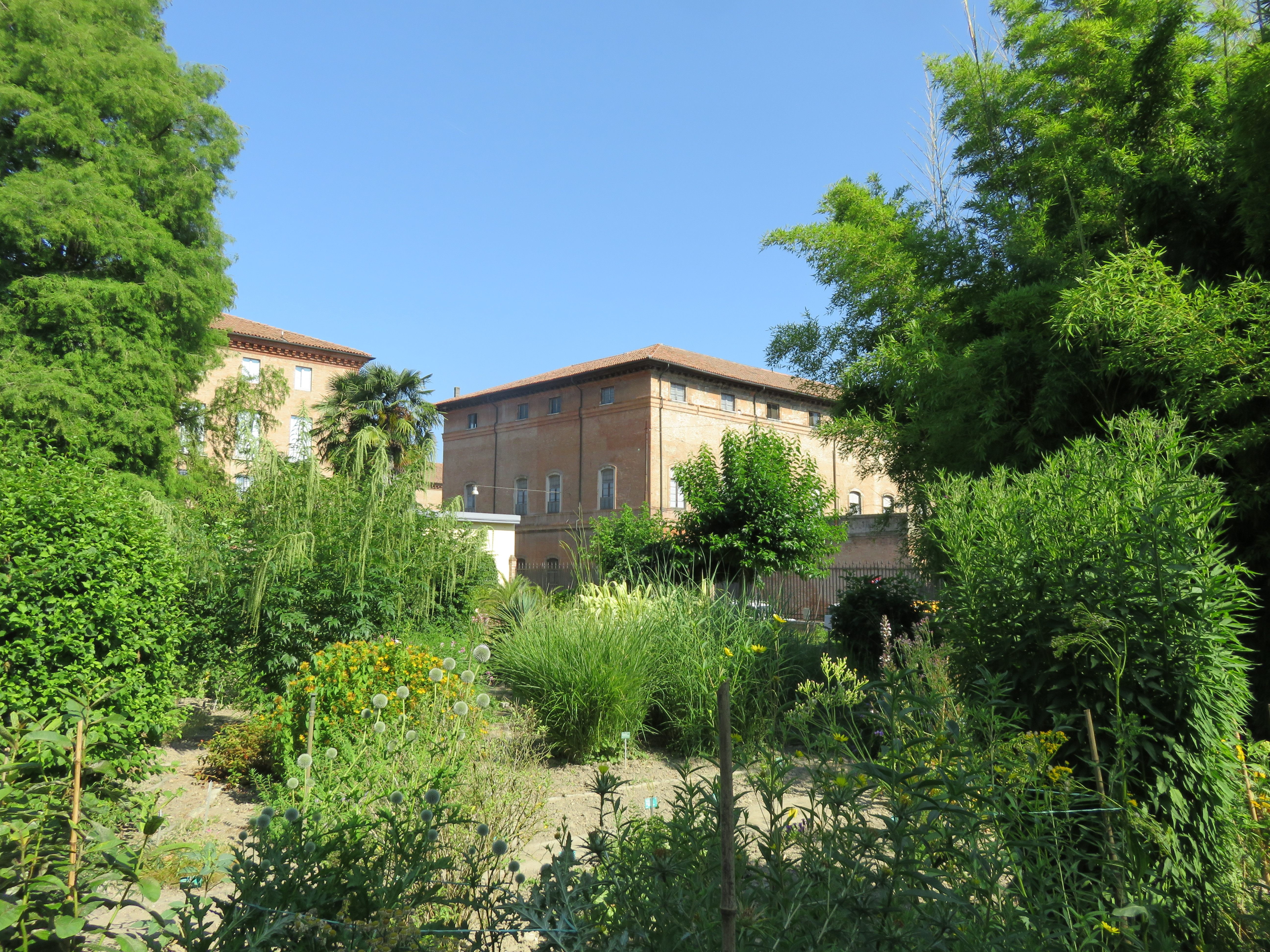 Vista dall'interno dell'orto botanico in direzione del Quadrivio degli Angeli